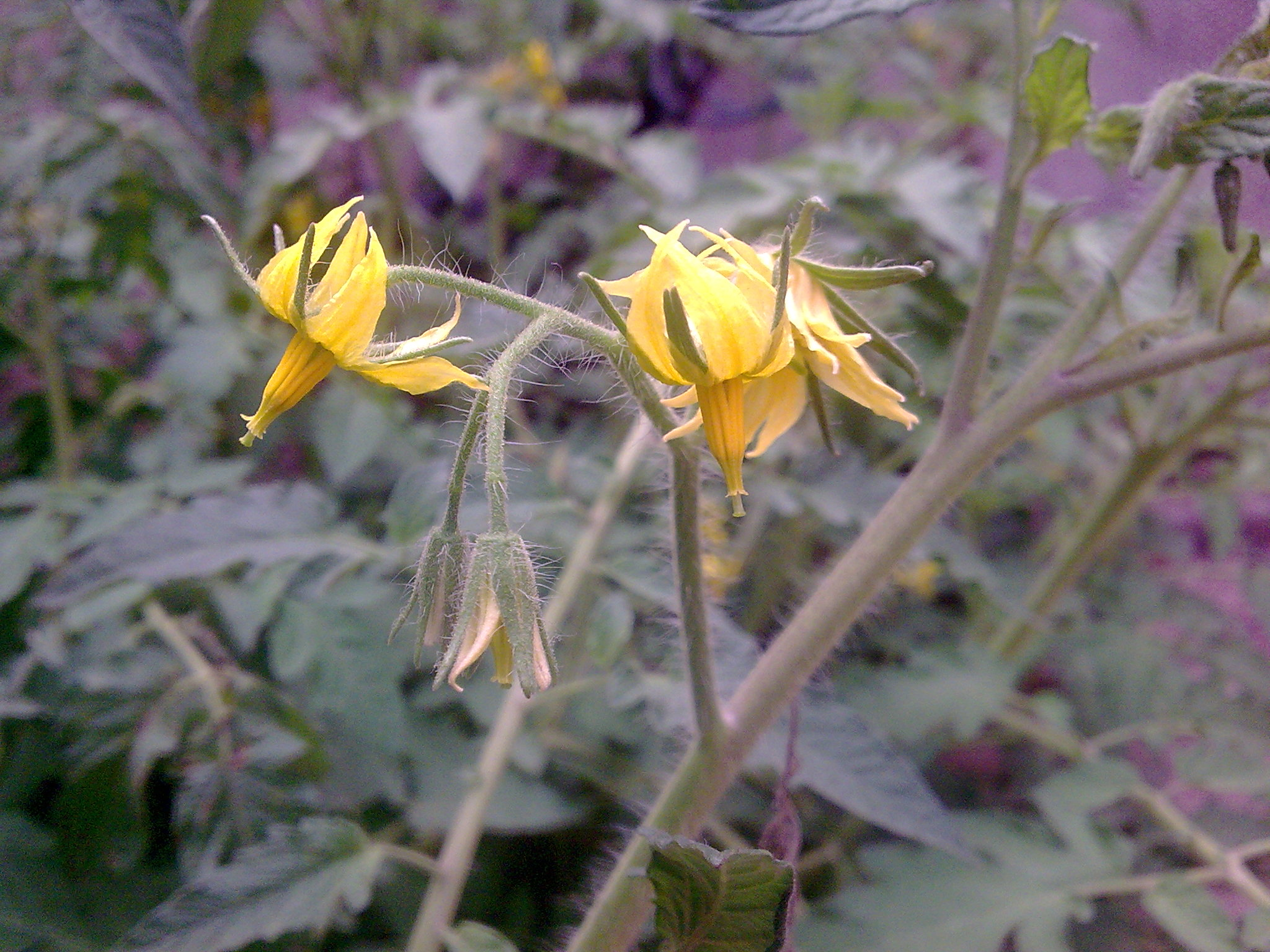 گلِ میوه گوجه